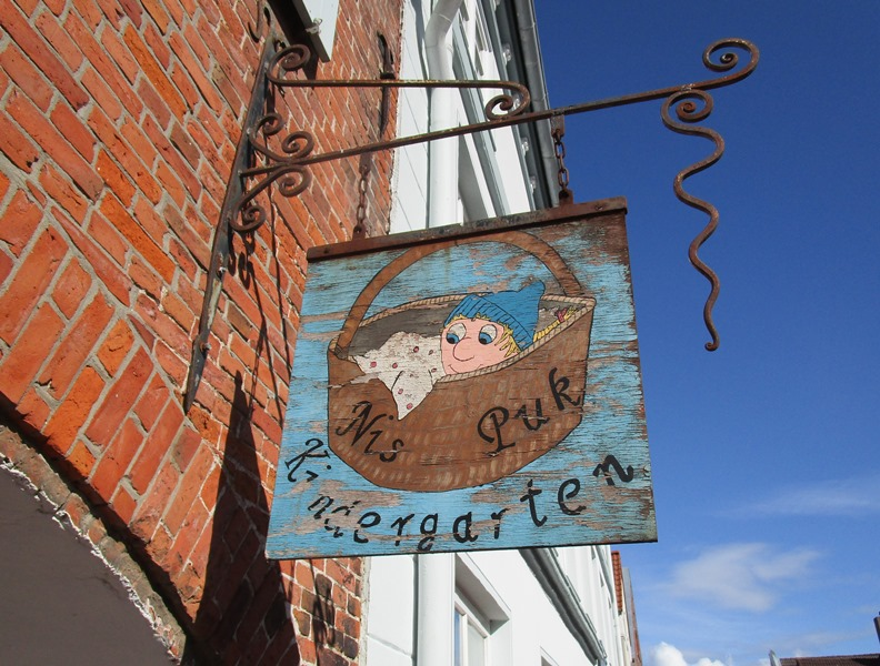 Nis Puk Børnehave i Tønning